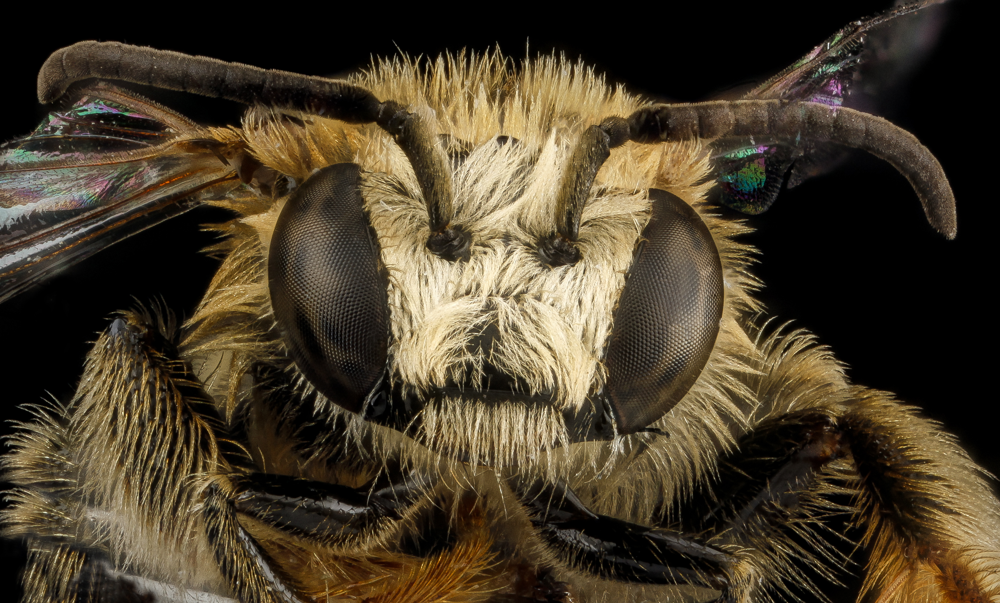 Dominican Republic